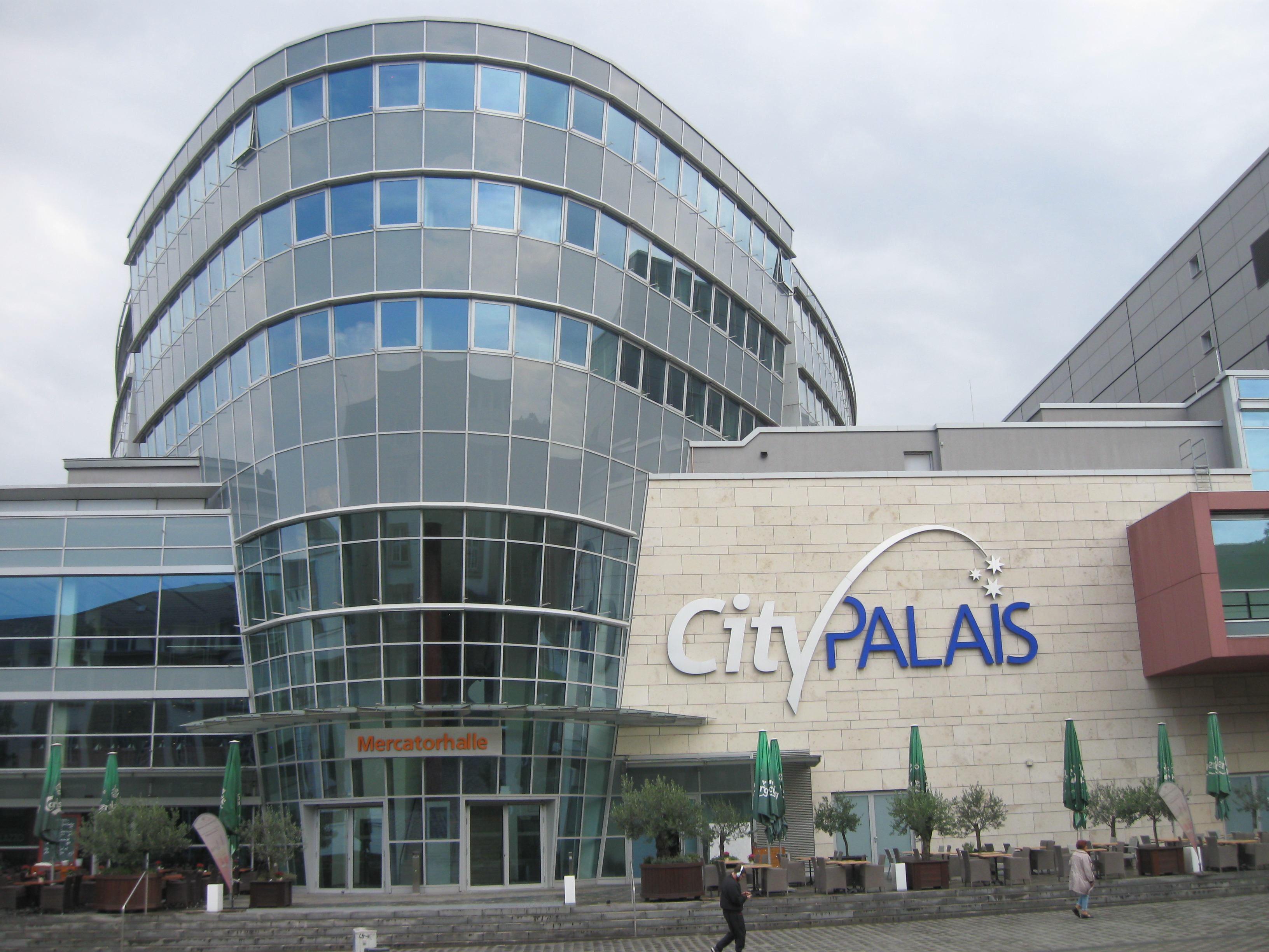 Nave comercial en el centro de Duisburgo